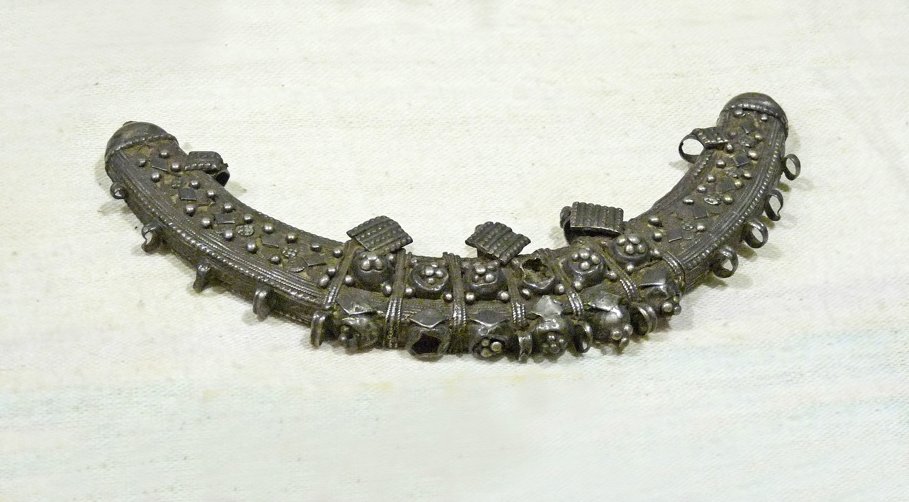 Harar (Ethiopie) : pendentif "banane". Musée d'histoire naturelle et d'ethnographie de Colmar